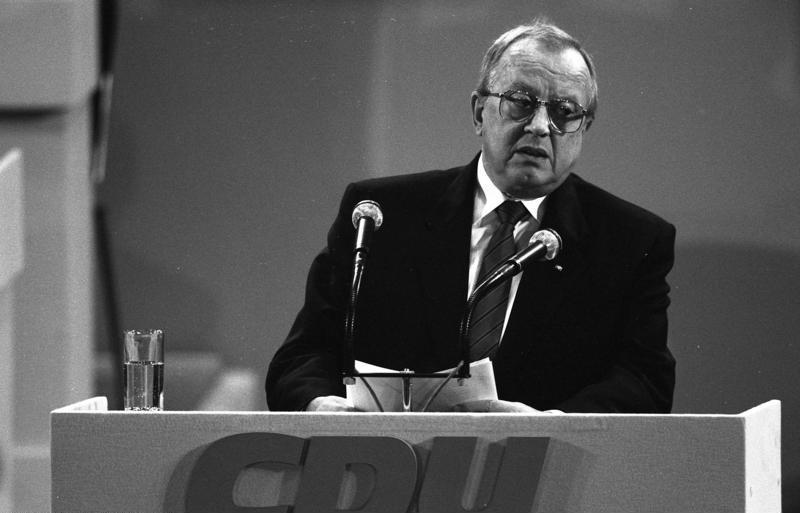 9.11.1987 35. Bundesparteitag der CDU in der Beethovenhalle, Bonn